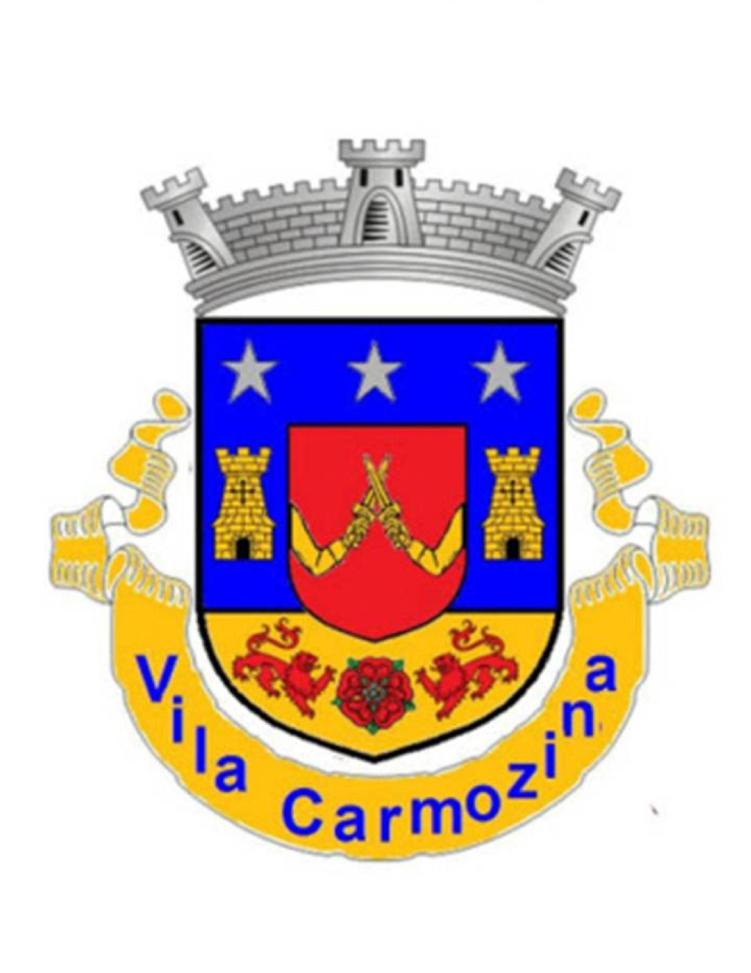 Escudo de Armas da Vila Carmozina, em Itaquera, São Paulo, Brasil.